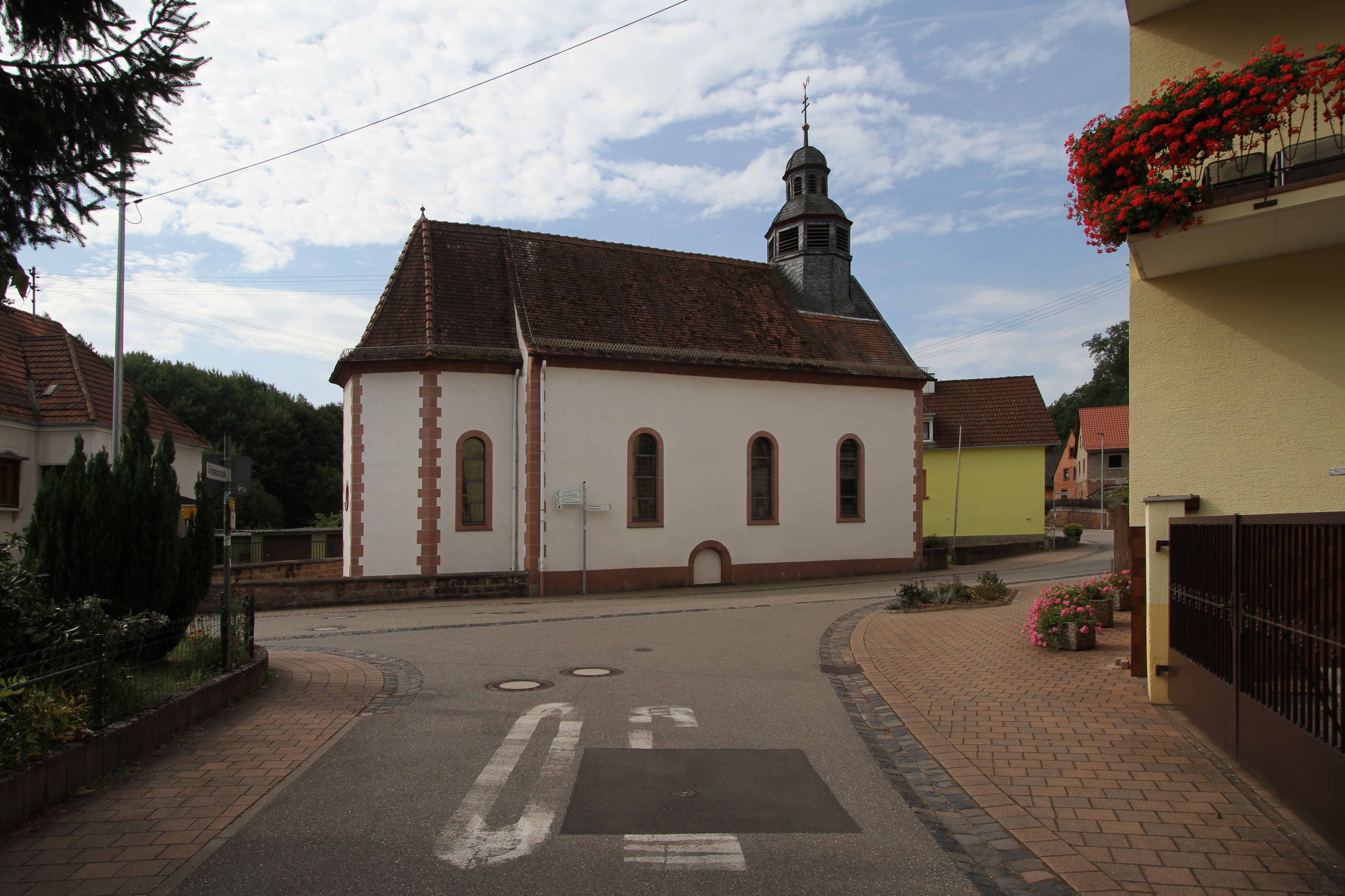 Erlenbach bei Dahn, Hauptstraße 11; katholische Kirche Mariä Himmelfahrt und St. Ägidius; neoromanischer Saalbau, 1900.